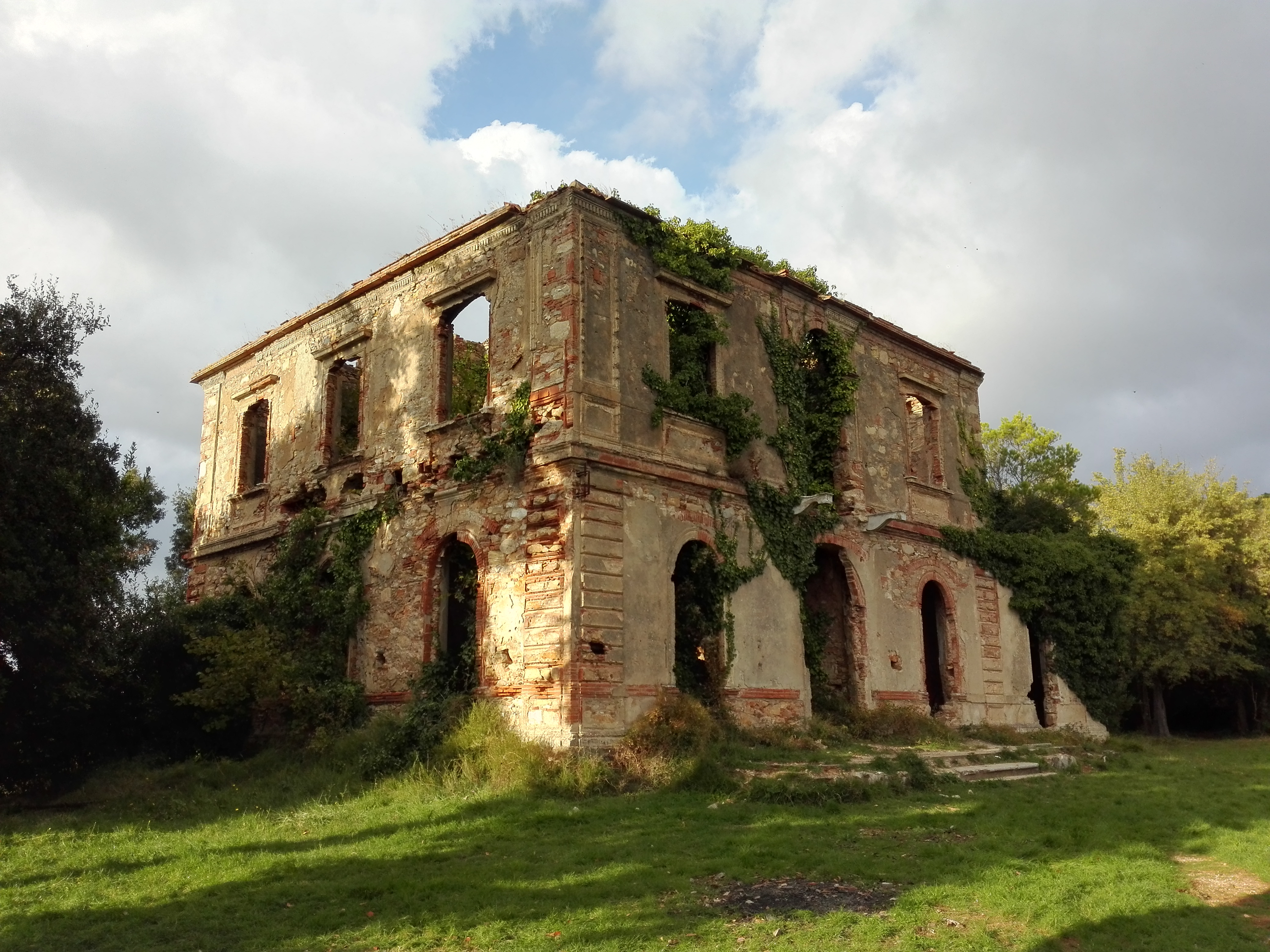 Villa Bosniascki attualmente.